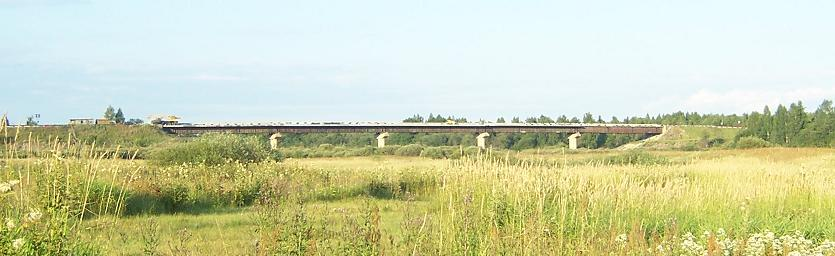 Мост через Днепр на «Старой Смоленской дороге» Р-134 «Смоленск — Вязьма — Зубцов» в районе деревни Соловьёво. Вид с того места, где в 1941 году находилась Соловьёвская переправа.